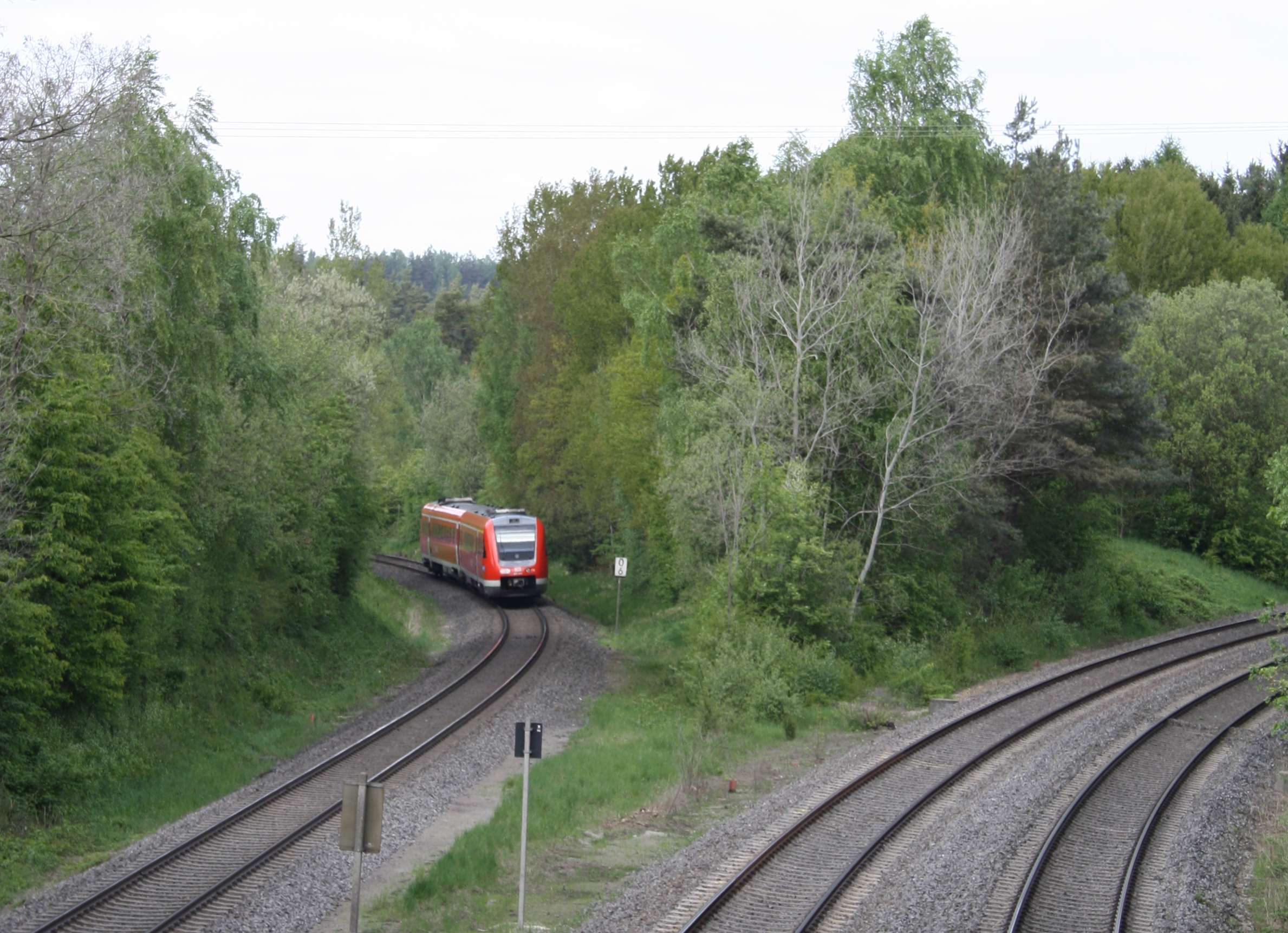 Abzweig am Bahnhof Schnabelwaid, Zug Richtung Bayreuth